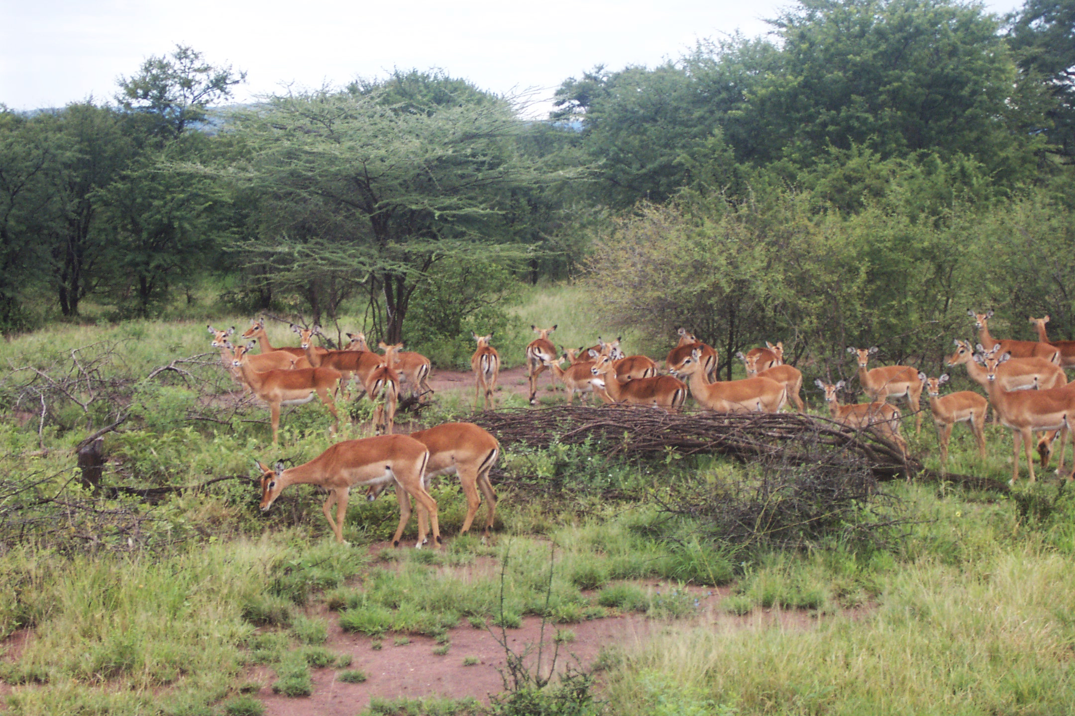 Antilopes impalas en Tanzanie